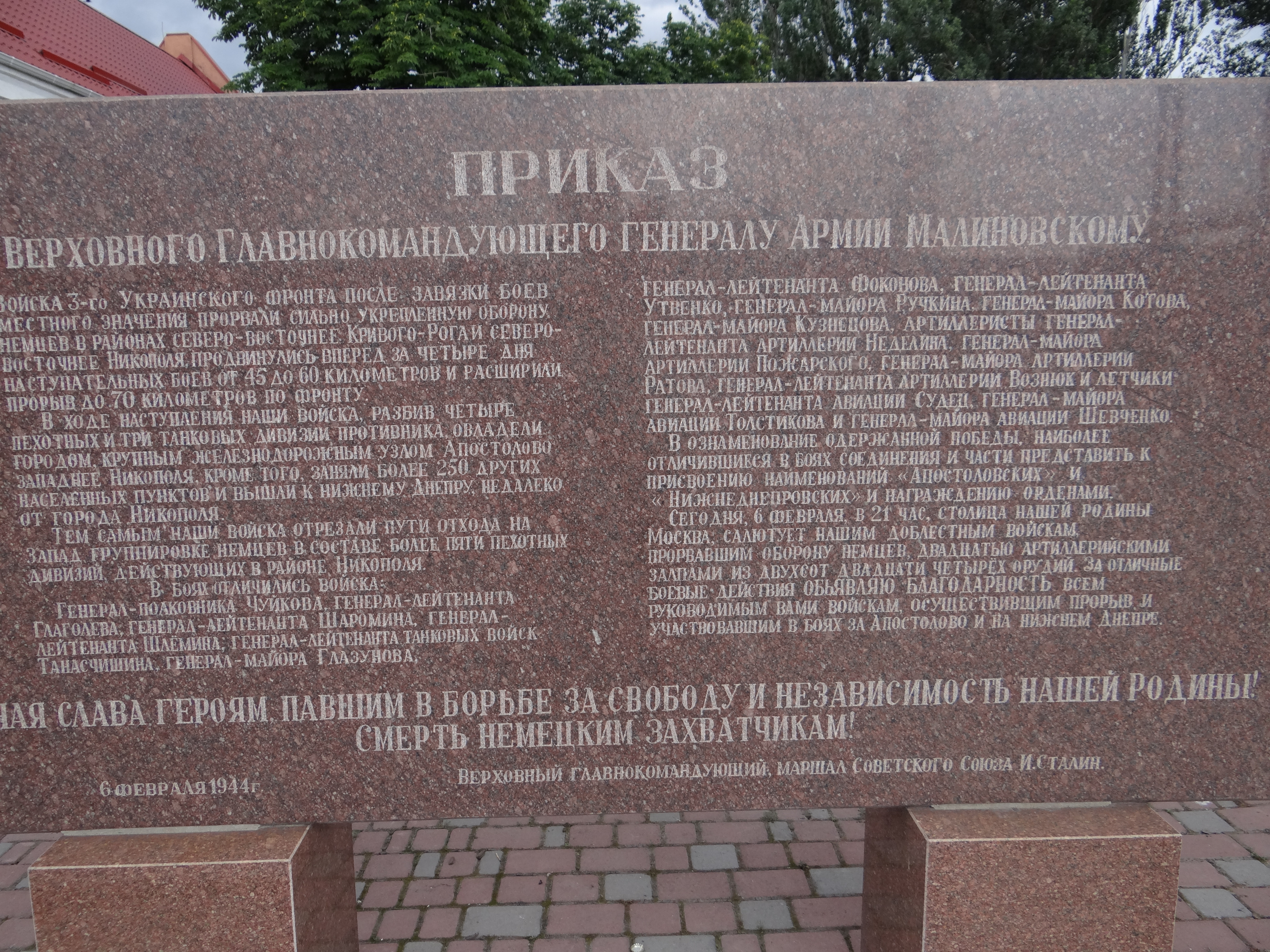 Плита про нагородження Рад. військ, що захопили Апостолове